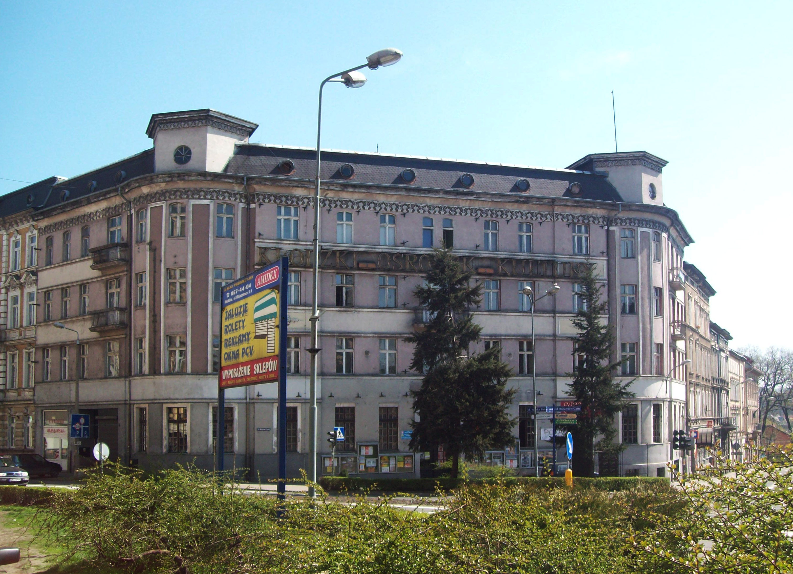 Główny gmach Kłodzkiego Centrum Kultury, Sportu i Rekreacji, dawny KOK